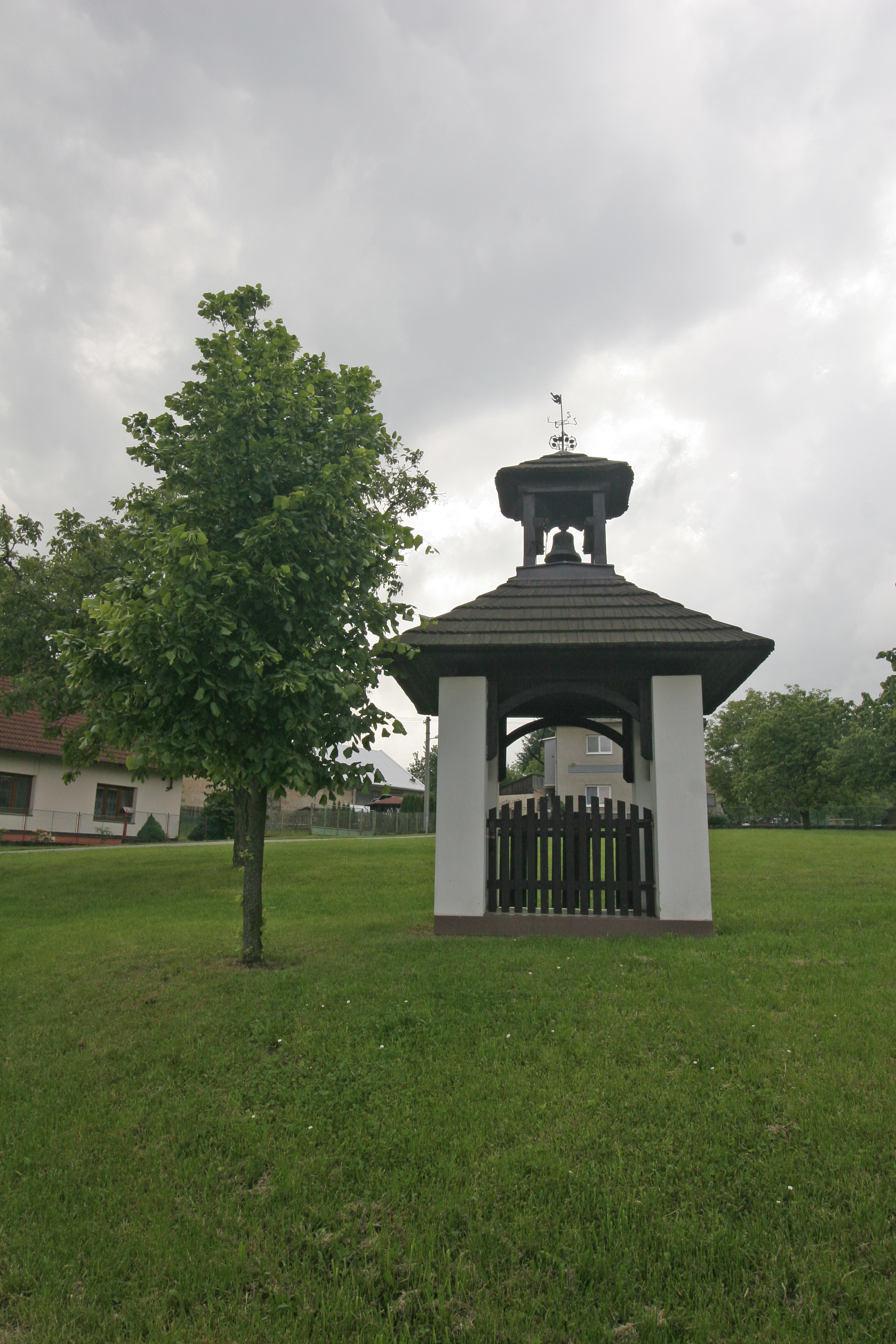 Liboměřice zvonička